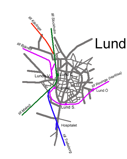 Karta sammanställd av olika uppgifter föreställande järnvägstationerna i Lund vid 1930-talet.